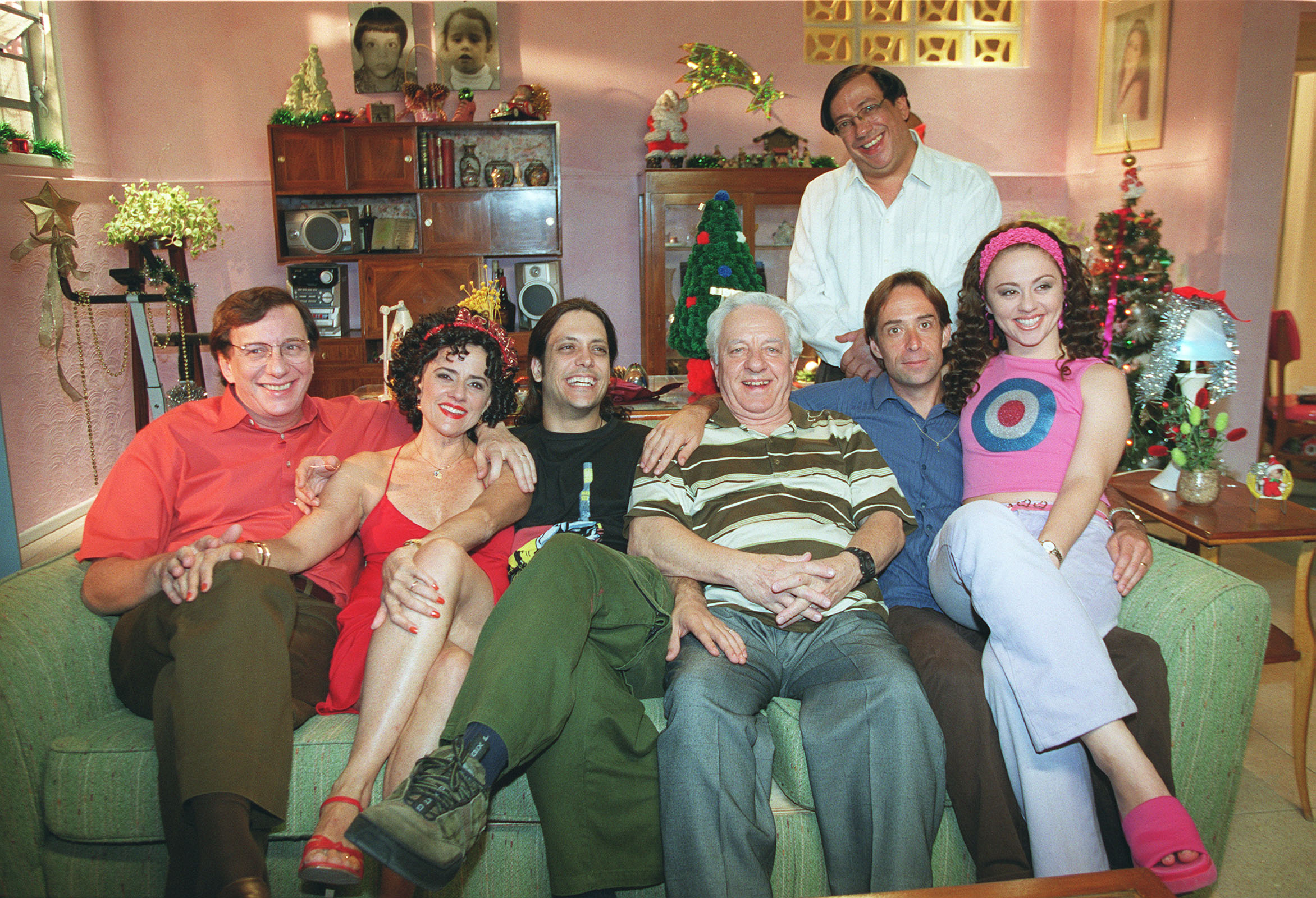 30/10/2001. Gravação de A Grande Família. Foto - Andréa Farias